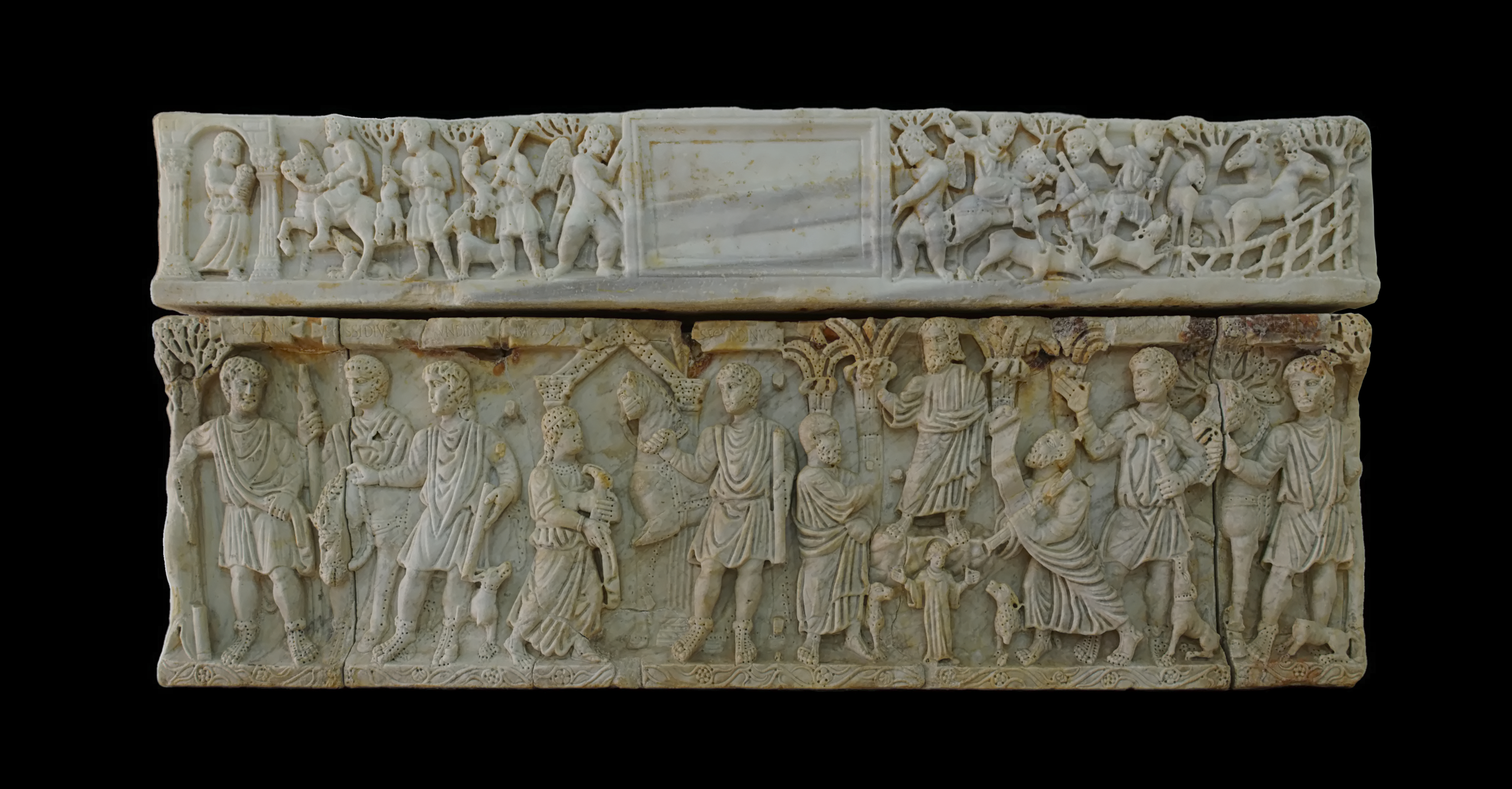 Sarcophage chrétien trouvé à Sayada (Tunisie) et exposé au musée de Lamta. This image was created with Hugin.